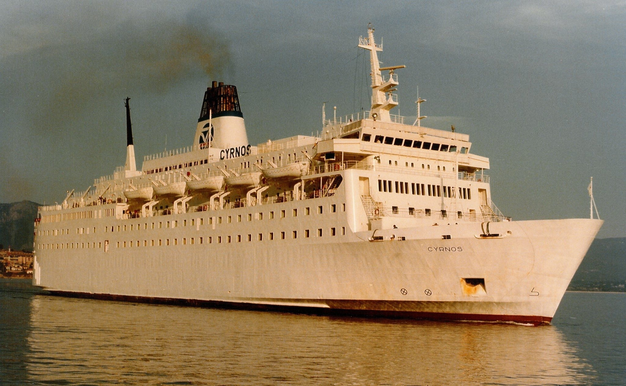 Le ferry Cyrnos (futur Île de Beauté) de la SNCM à Ajaccio.